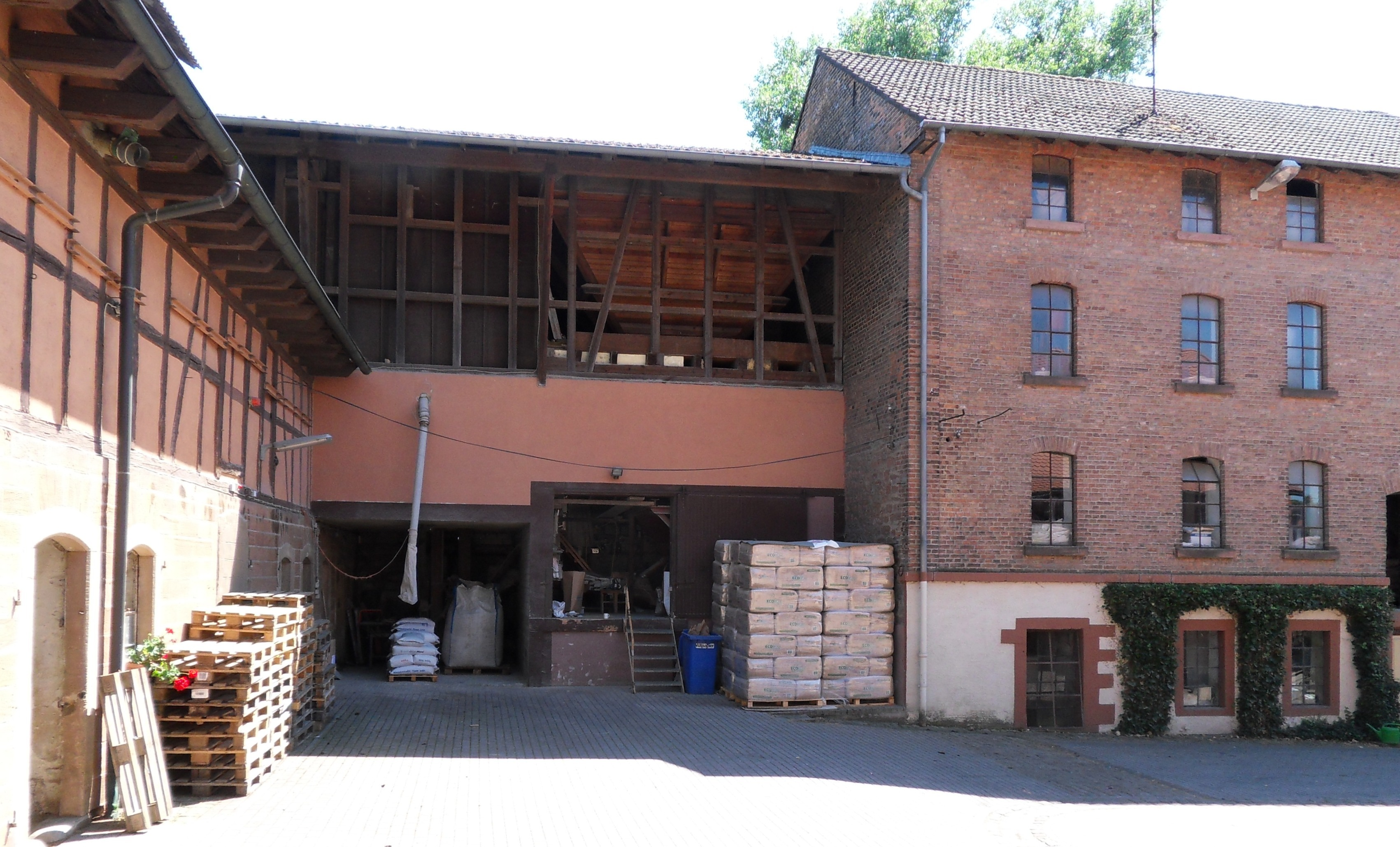 Denkmalgeschützte Stockheimer Mühle im Odenwald, Blick von Nordosten über den Hof auf die Mühlengebäude